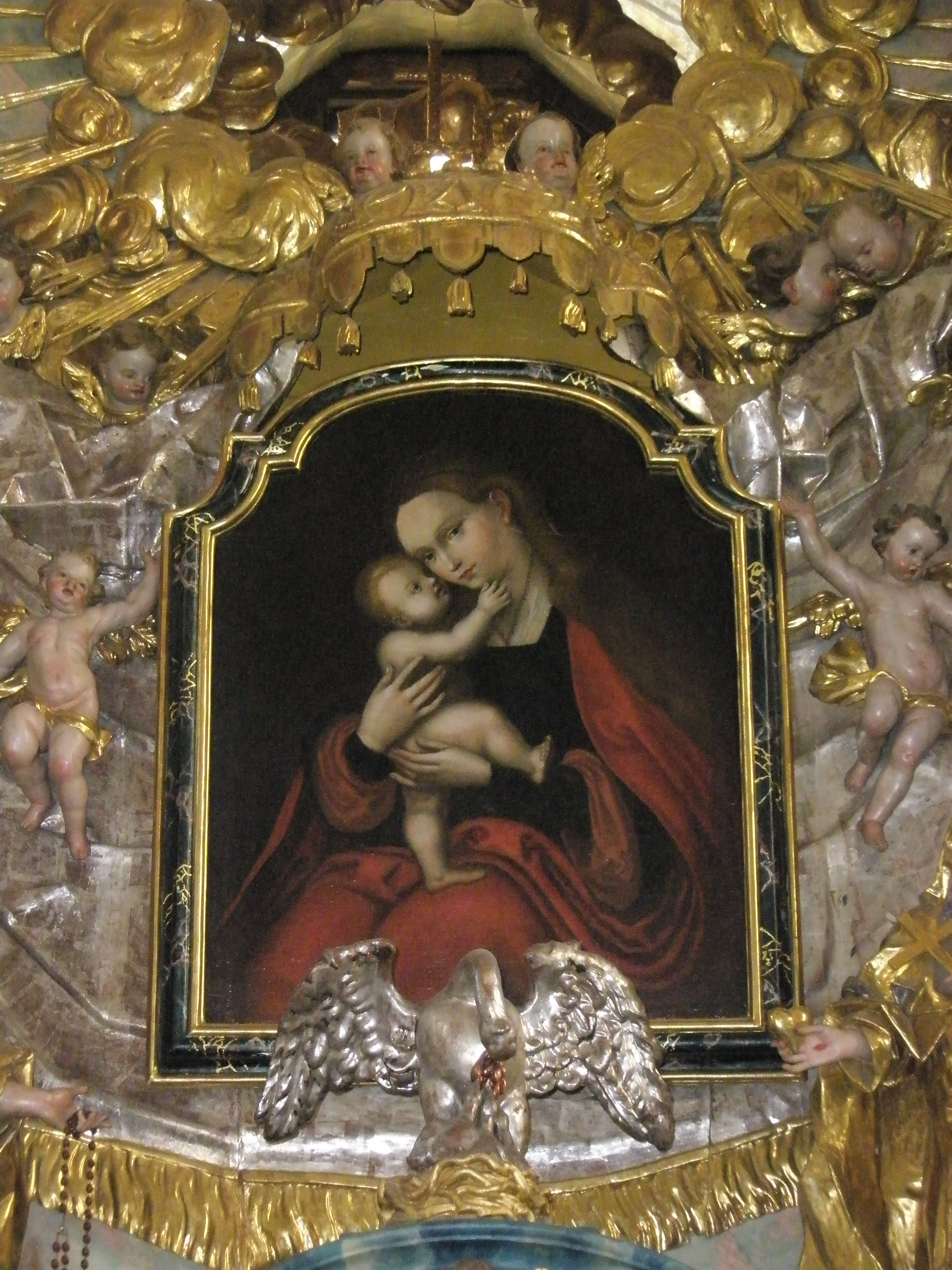 Das Gnadenbild Mariahilf am Schwendier Hochaltar.